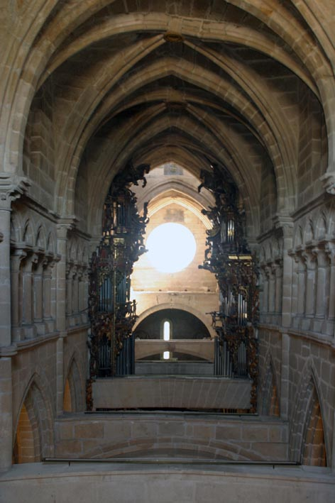 Nave mayor de la Catedral de Tuy (Pontevedra, España).